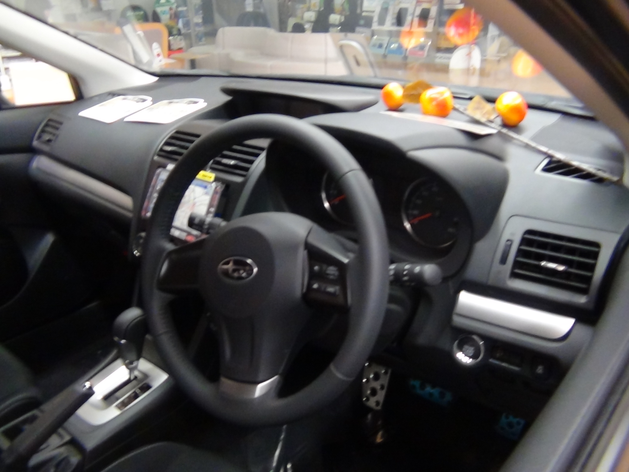 2012年11月10日、福岡スバル千早店にて撮影。